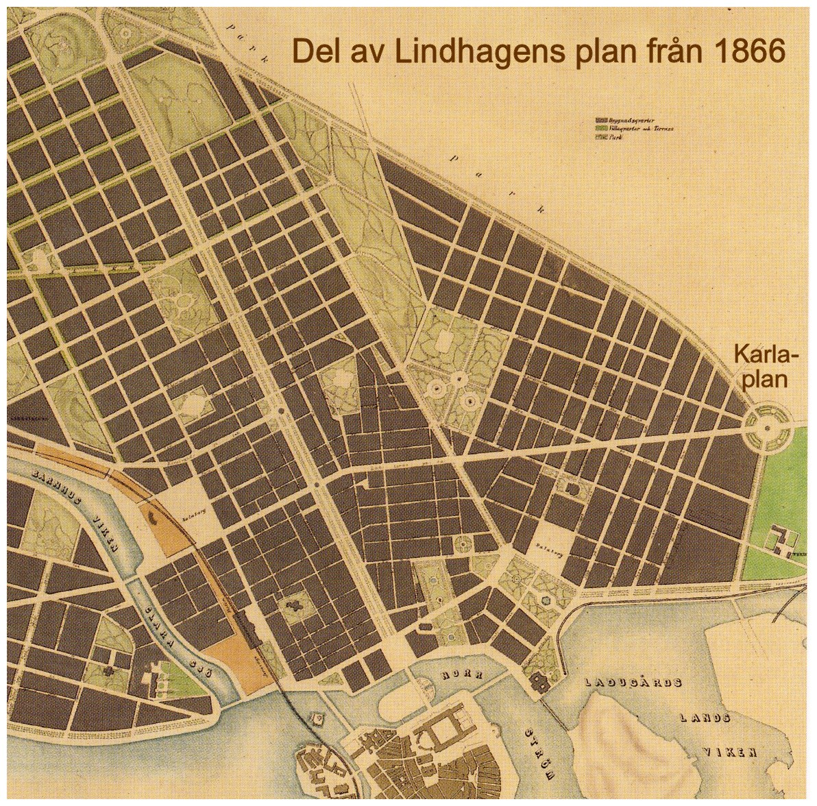 Del av Albert Lindhagens stadsplan visande Östermalm år 1866